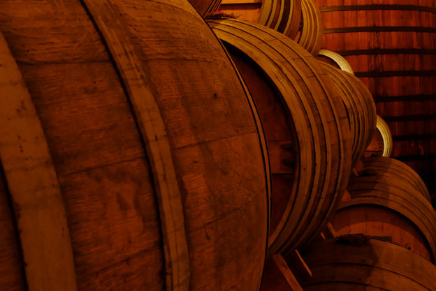 Savanna, La Réunion chais fût de chêne